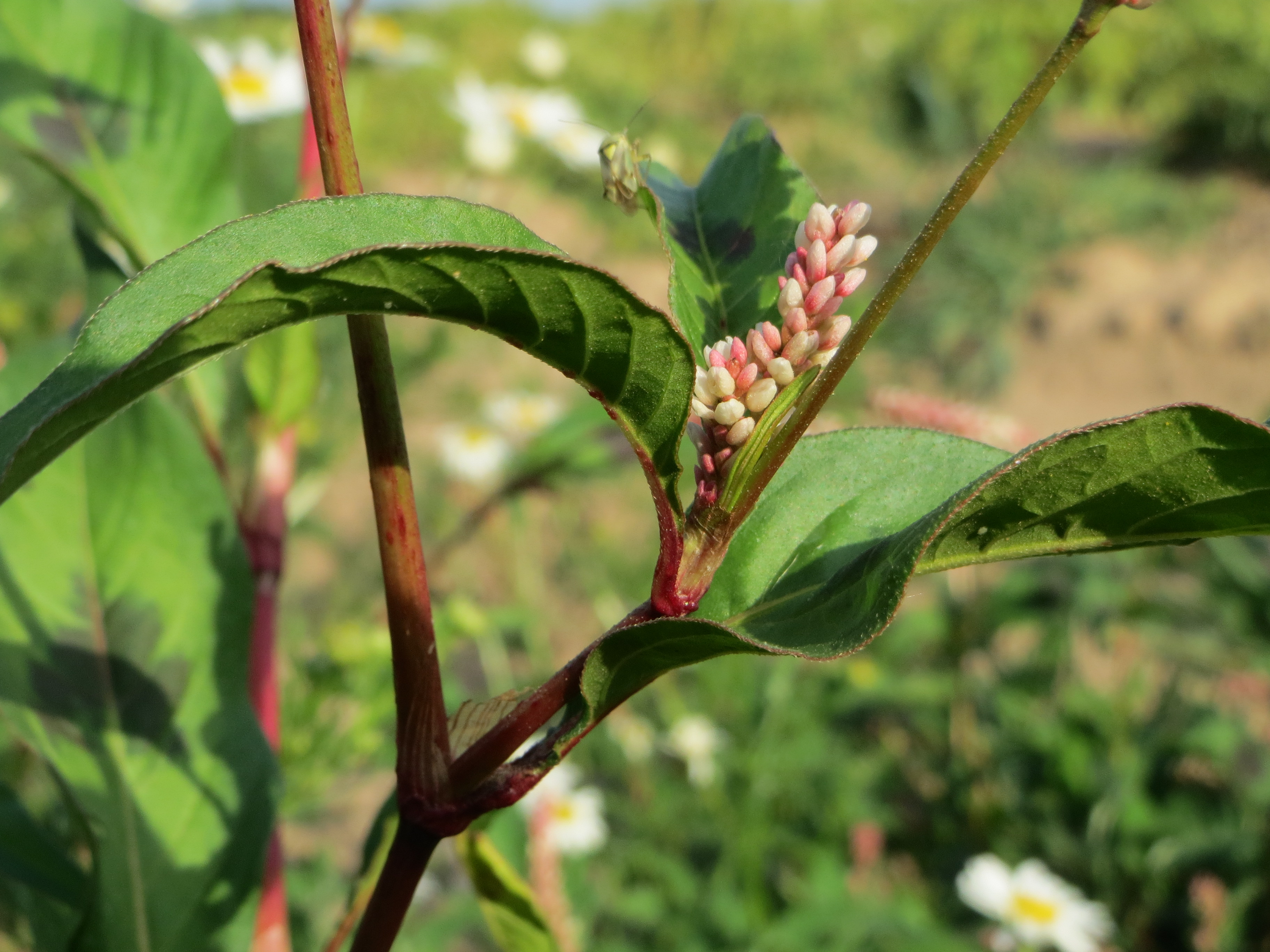 Ampfer-Knöterich (Persicaria lapathifolia) bei Hockenheim